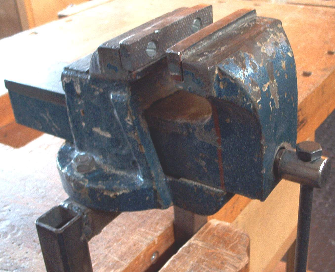 zelf gemaakte foto voor het publiek domein. Martink.